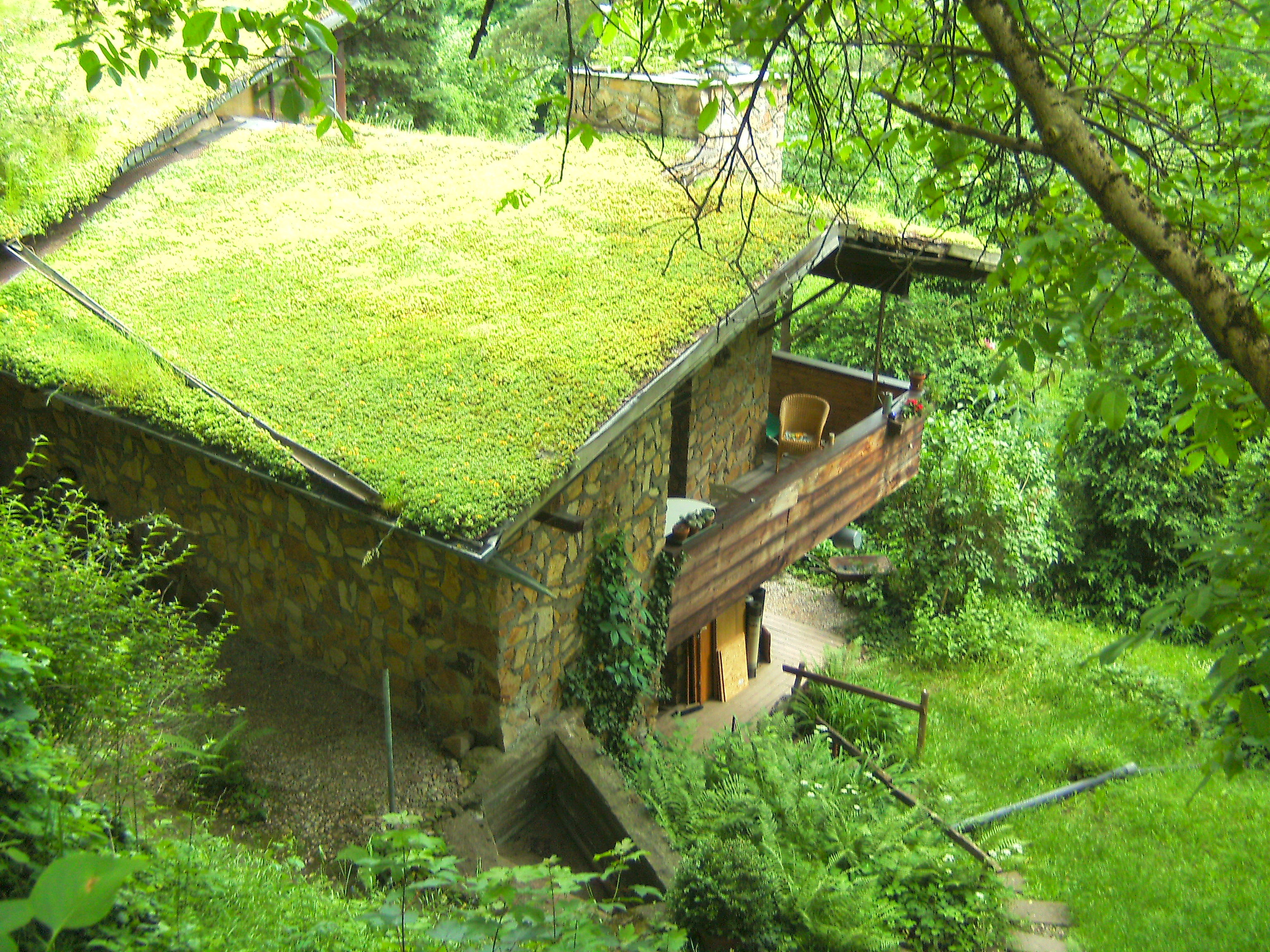 Gebäude Neckarhalde 43 (sic!), Tübingen